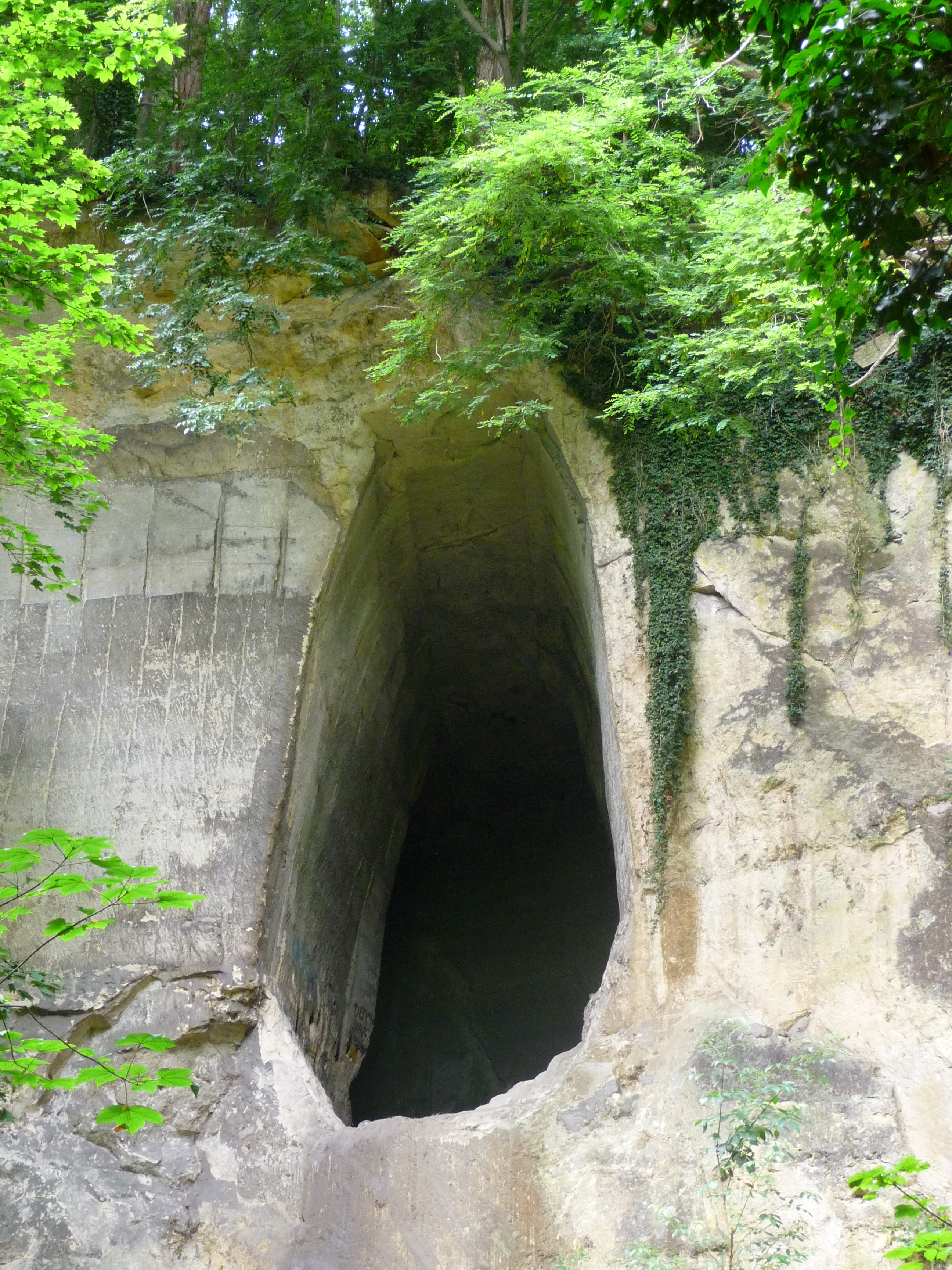 De Verloren Vallei op de St Pietersberg